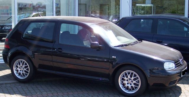 Golf IV schwarz, own work, GFDL